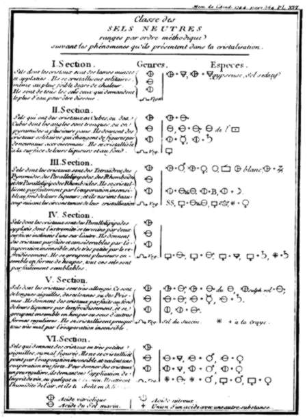 Tableau de classification des sels neutres de Rouelle publié dans Mémoire sur les sels neutres de 1744. On remarque l'utilisation d'une petite croix (le signe plus +) entre les réactifs.